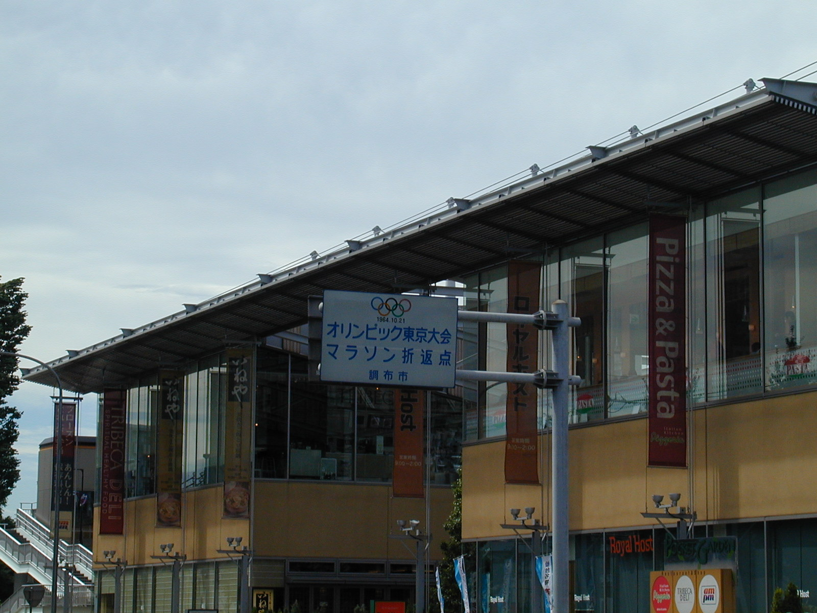 調布市甲州街道